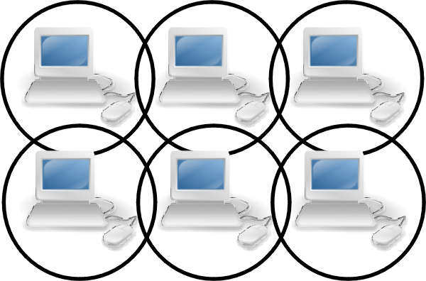 Debuxo realizado a partir de e